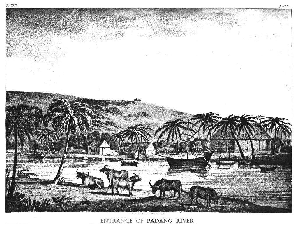 Padang River